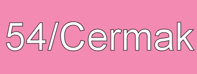 54/Cermak destination sign (Pink)